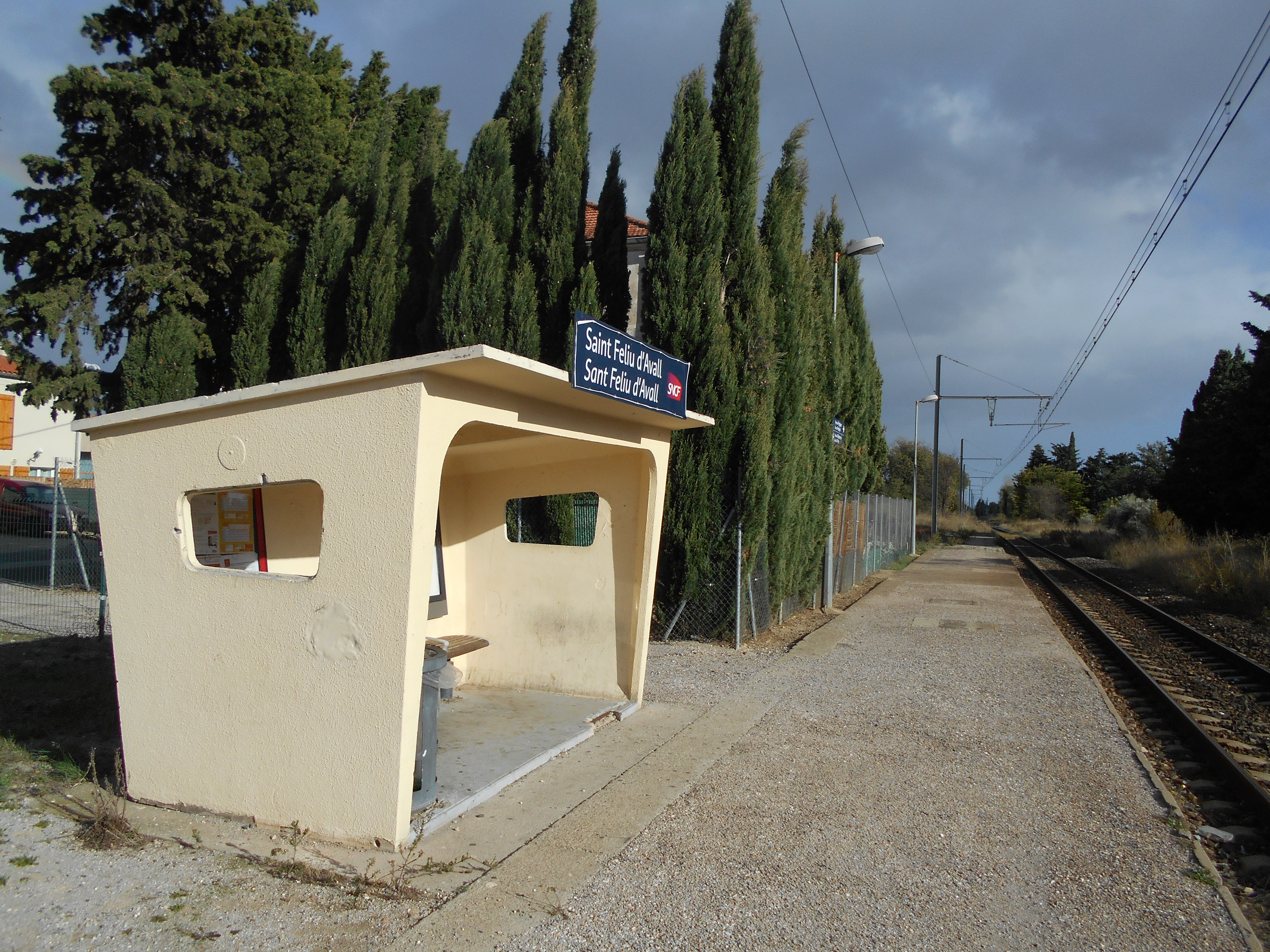 Estació de Sant Feliu d'Avall